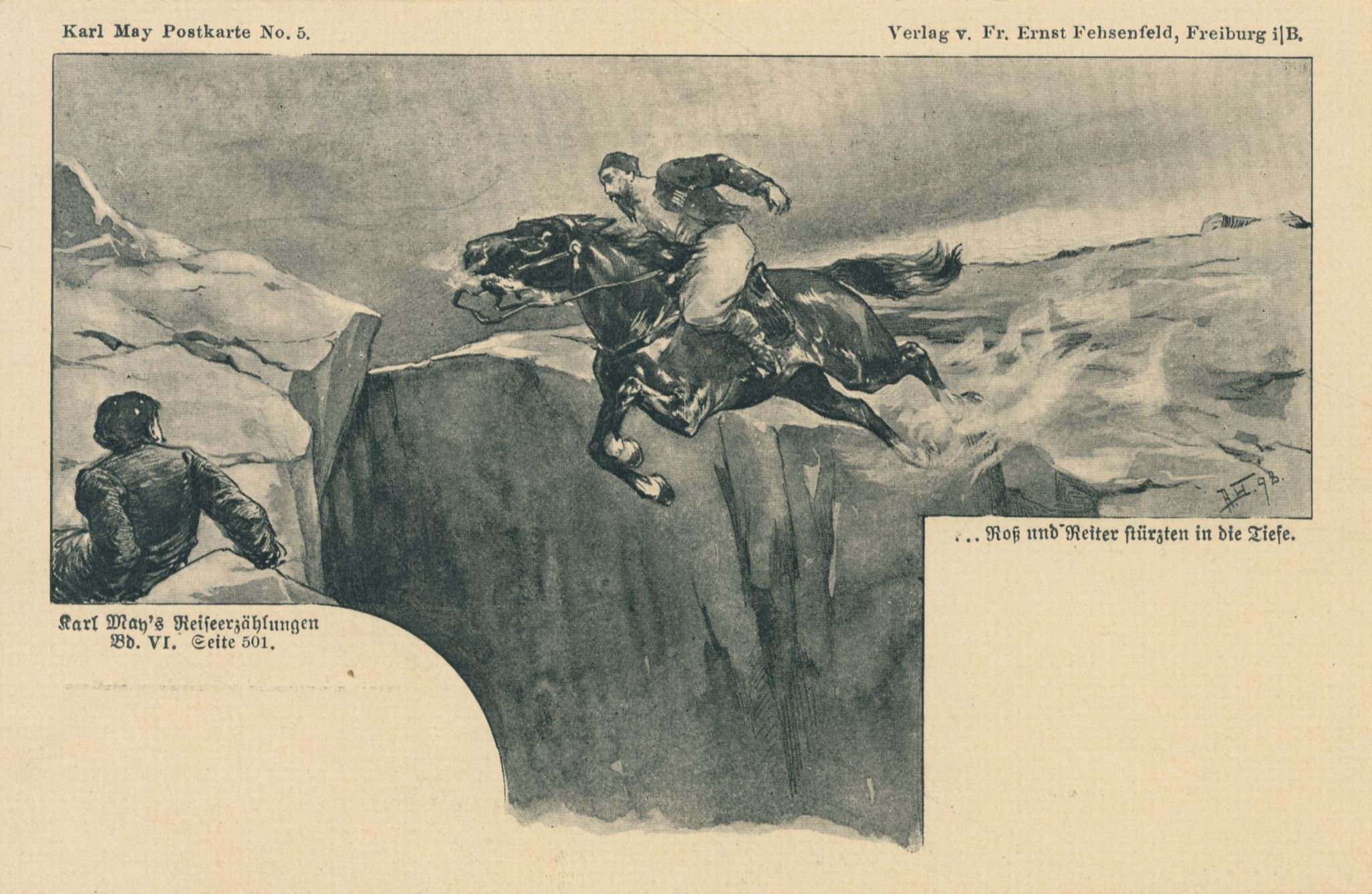 Karl May Postkarte No. 5. ...Roß und Reiter stürzten in die Tiefe., Karl May’s Reiseerzählungen Bd. VI (Der Schut). Seite 501.